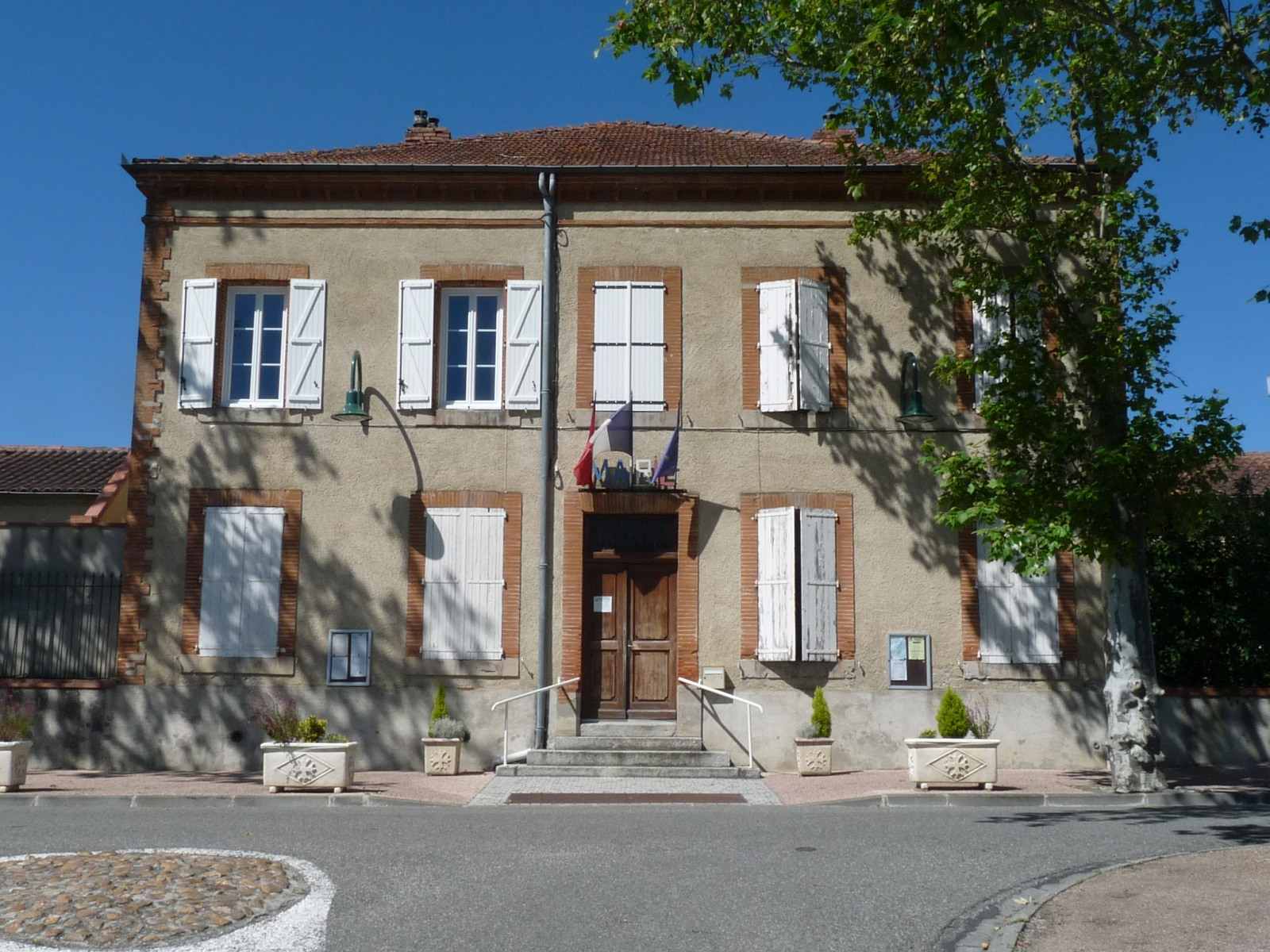 Mairie du Faget, Haute-Garonne, France